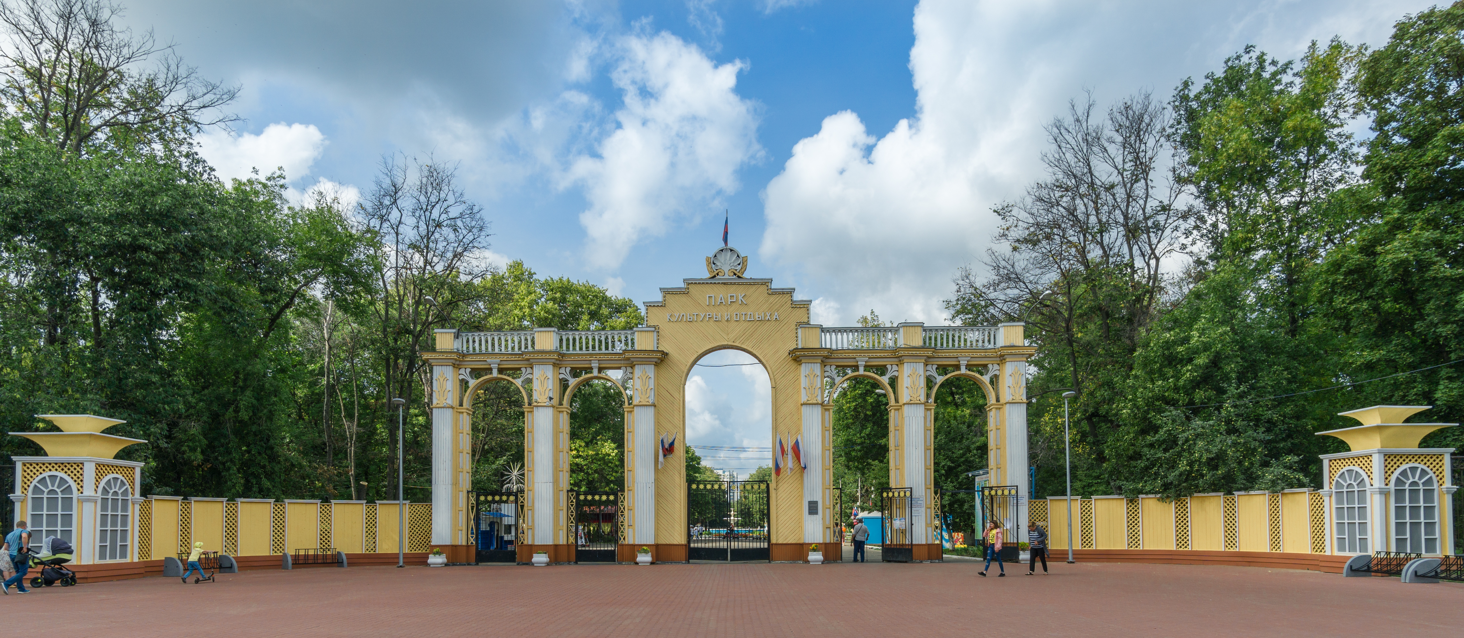 Автозаводский парк культуры и отдыха: Автозаводский парк культуры и отдыха, Нижний Новгород, Нижегородская область